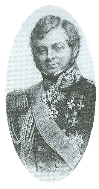 Vce admiraal de Rijk